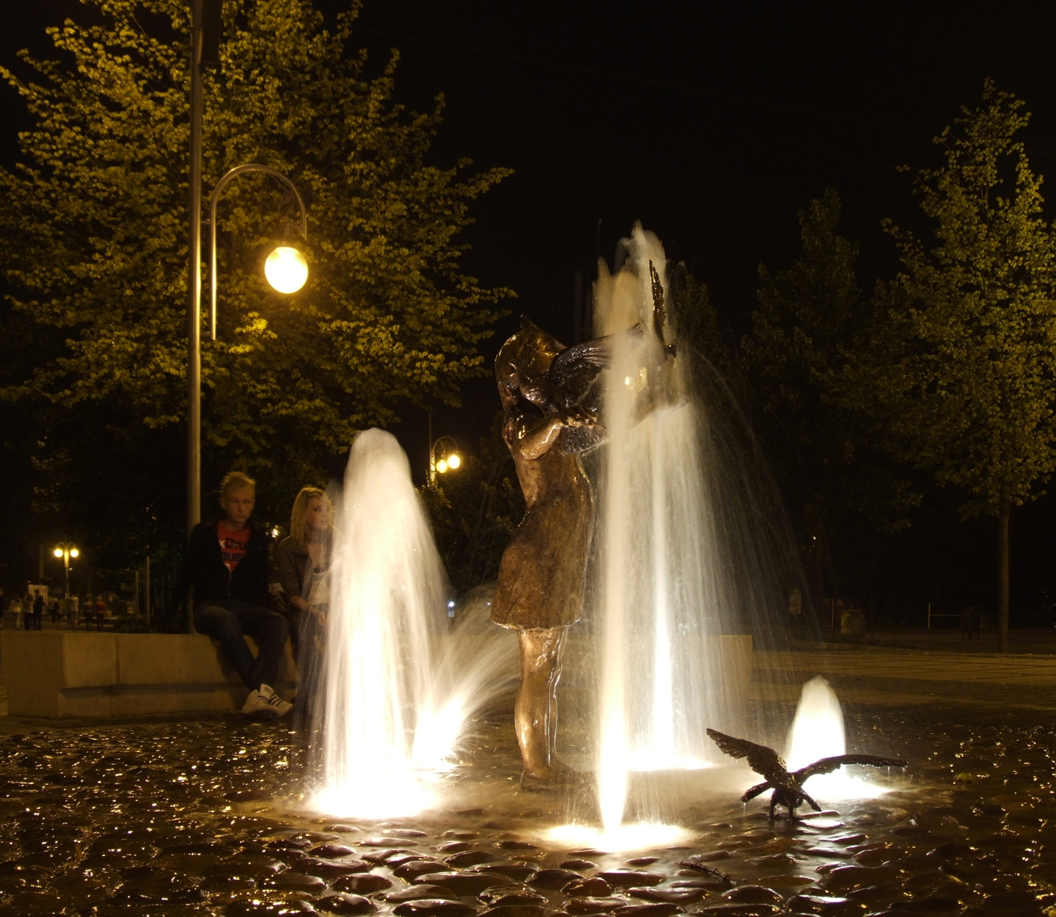 "Dziewczynka z gołębiami" - pomnik na III Alei NMP, Częstochowa. Autor: Ewa Maliszewska